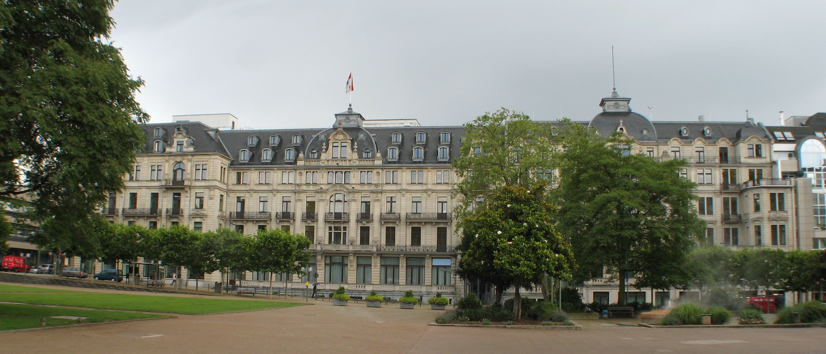 Hotel Rose Sitz der Staatskanzlei des Landes Hessen